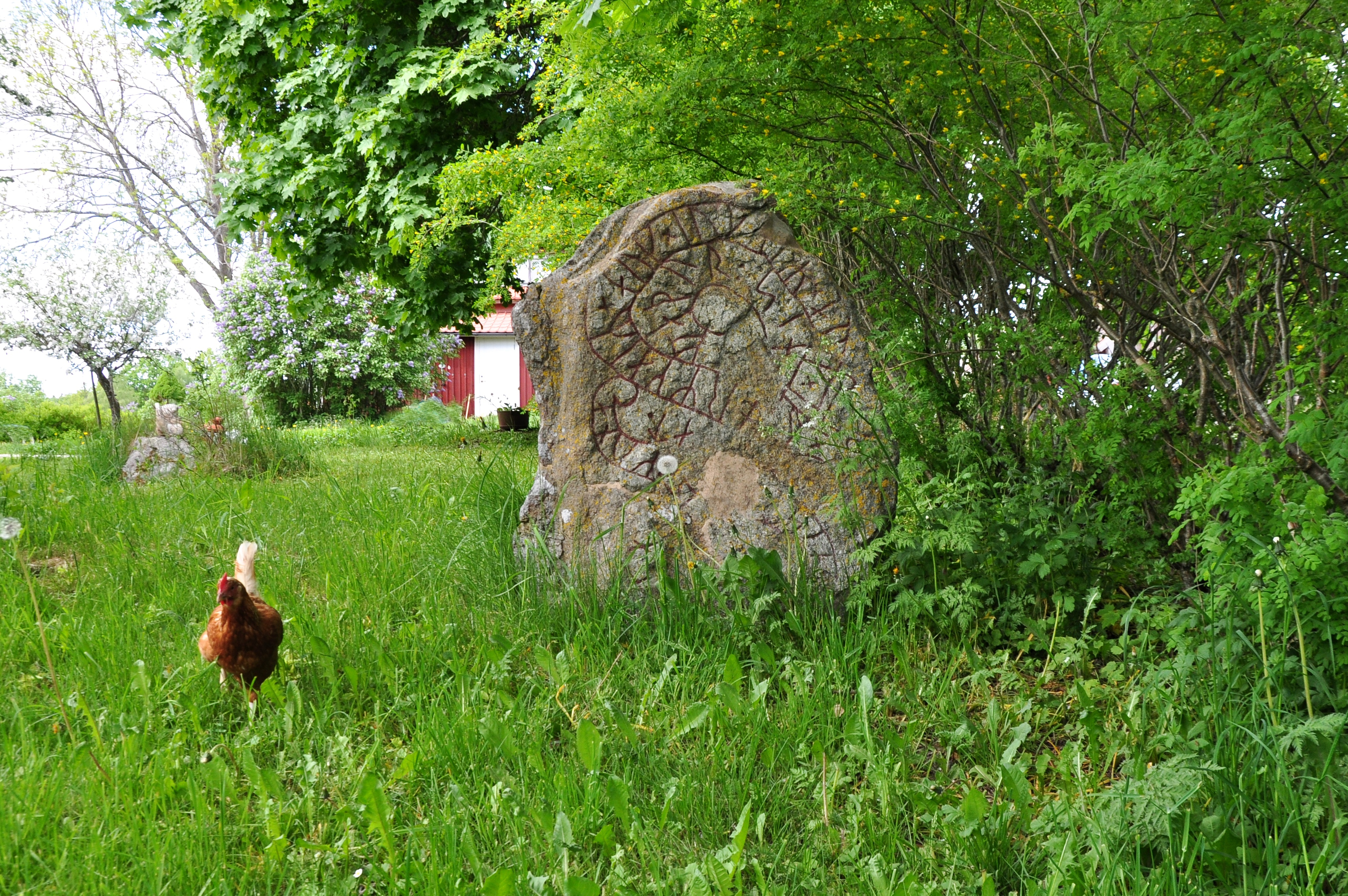 Runsten Sö 234 i Trollsta, Sorunda socken, Södermanland.